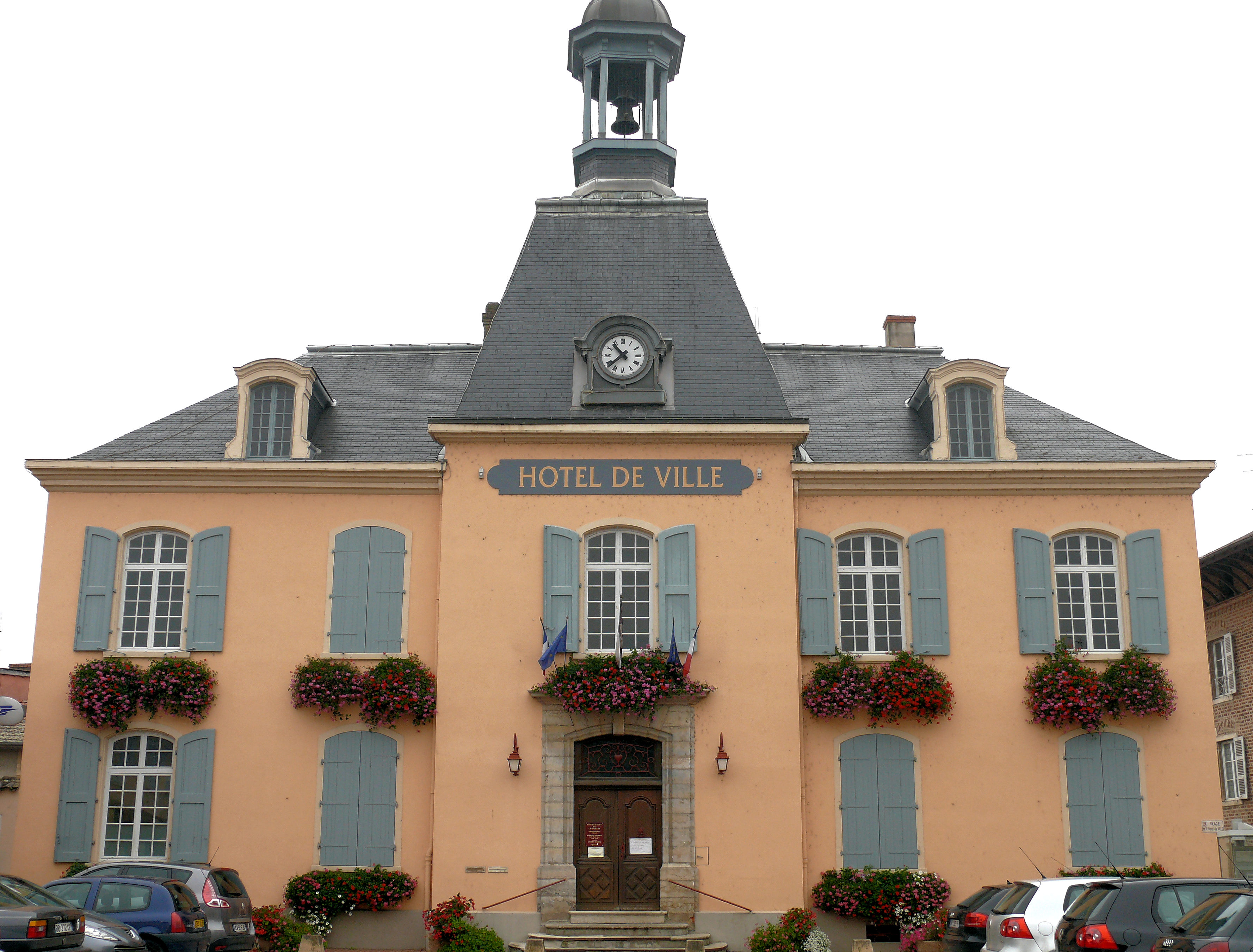 Saint-Trivier-sur-Moignans - Hôtel de ville